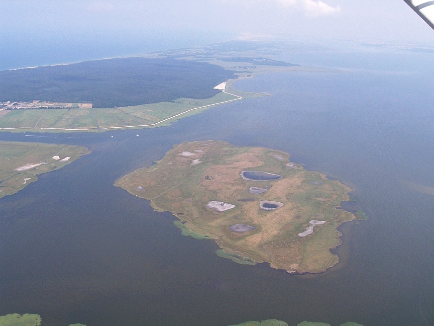 Luftbildaufnahme der Barther Oie